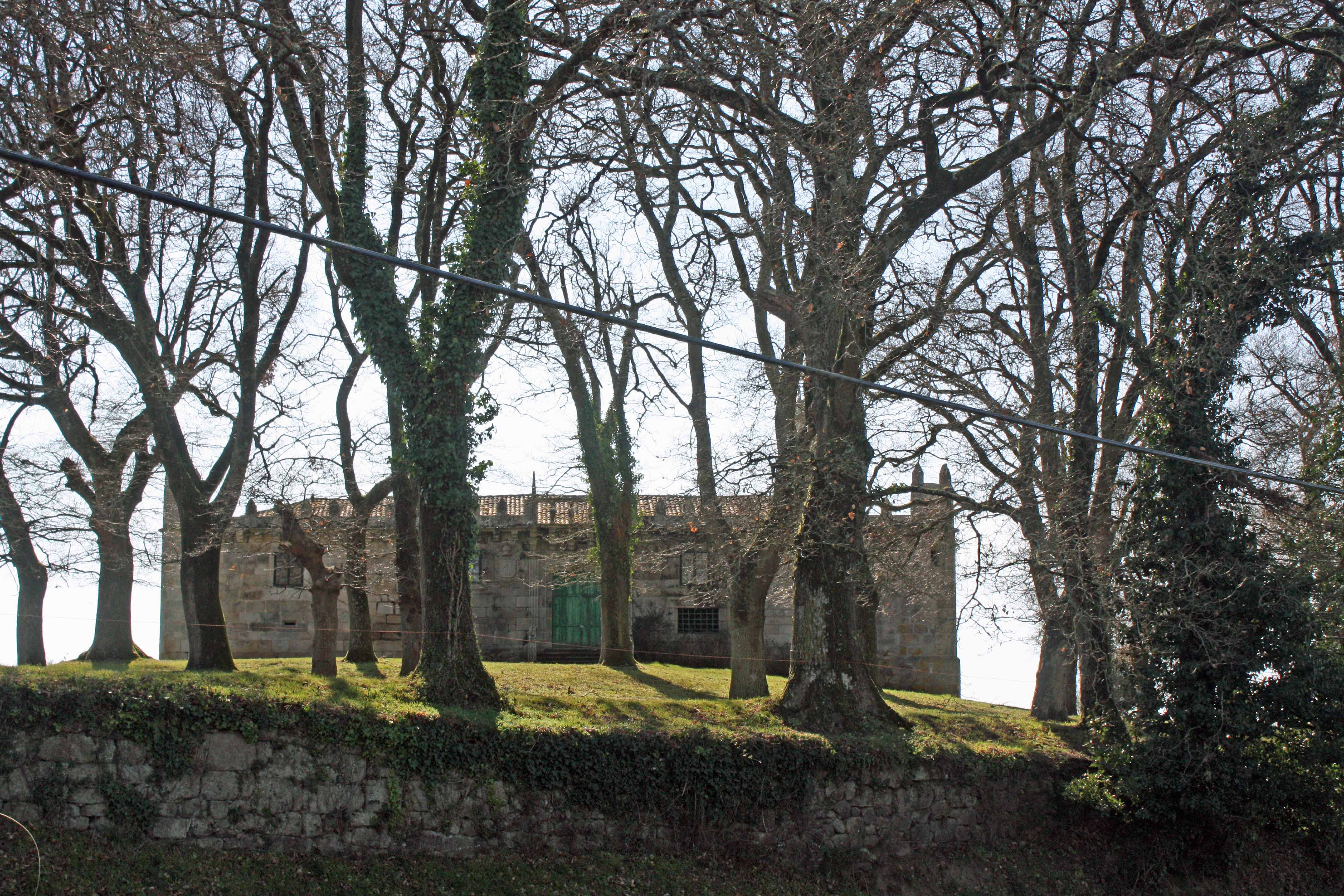 Pazo de Borraxeiros, Agolada (Pontevedra)